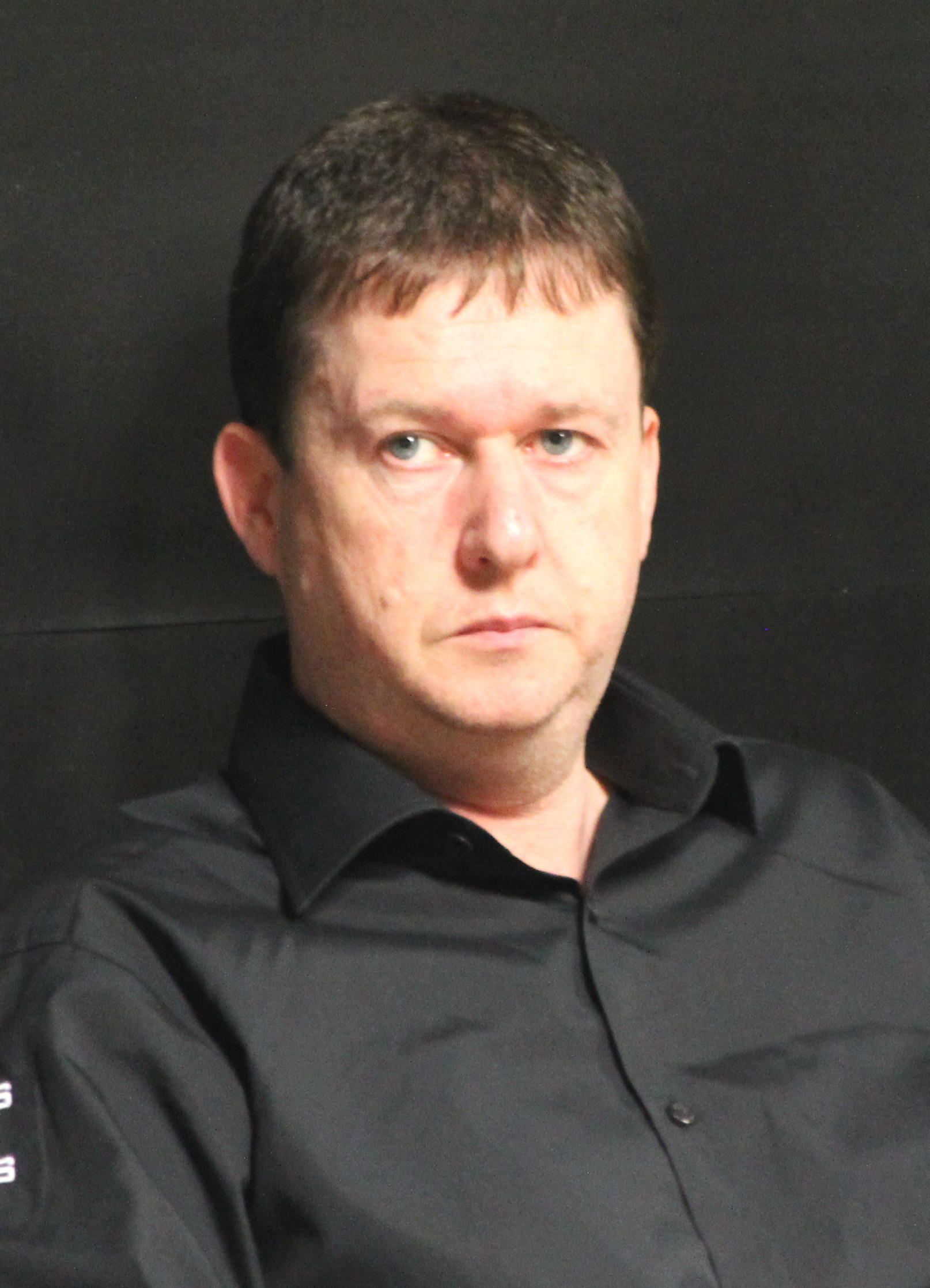 Mike Dunn beim Paul Hunter Classic 2014